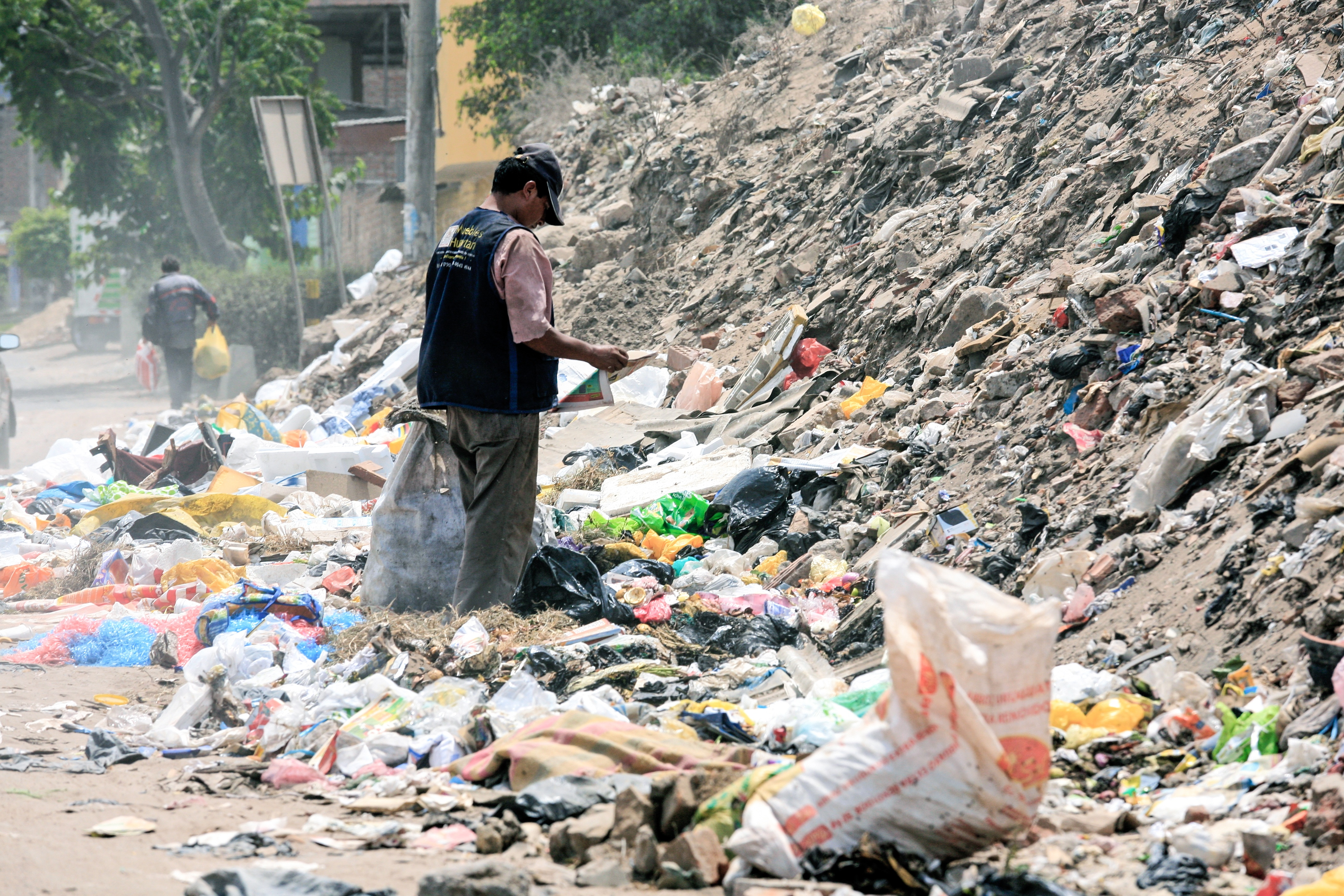 Peru